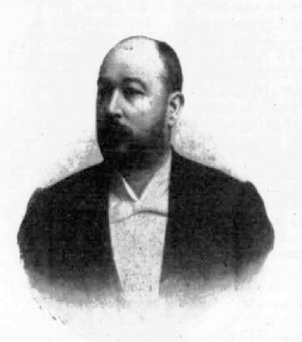 Eustach Neubert (1856-1907), rakouský a český inženýr a politik